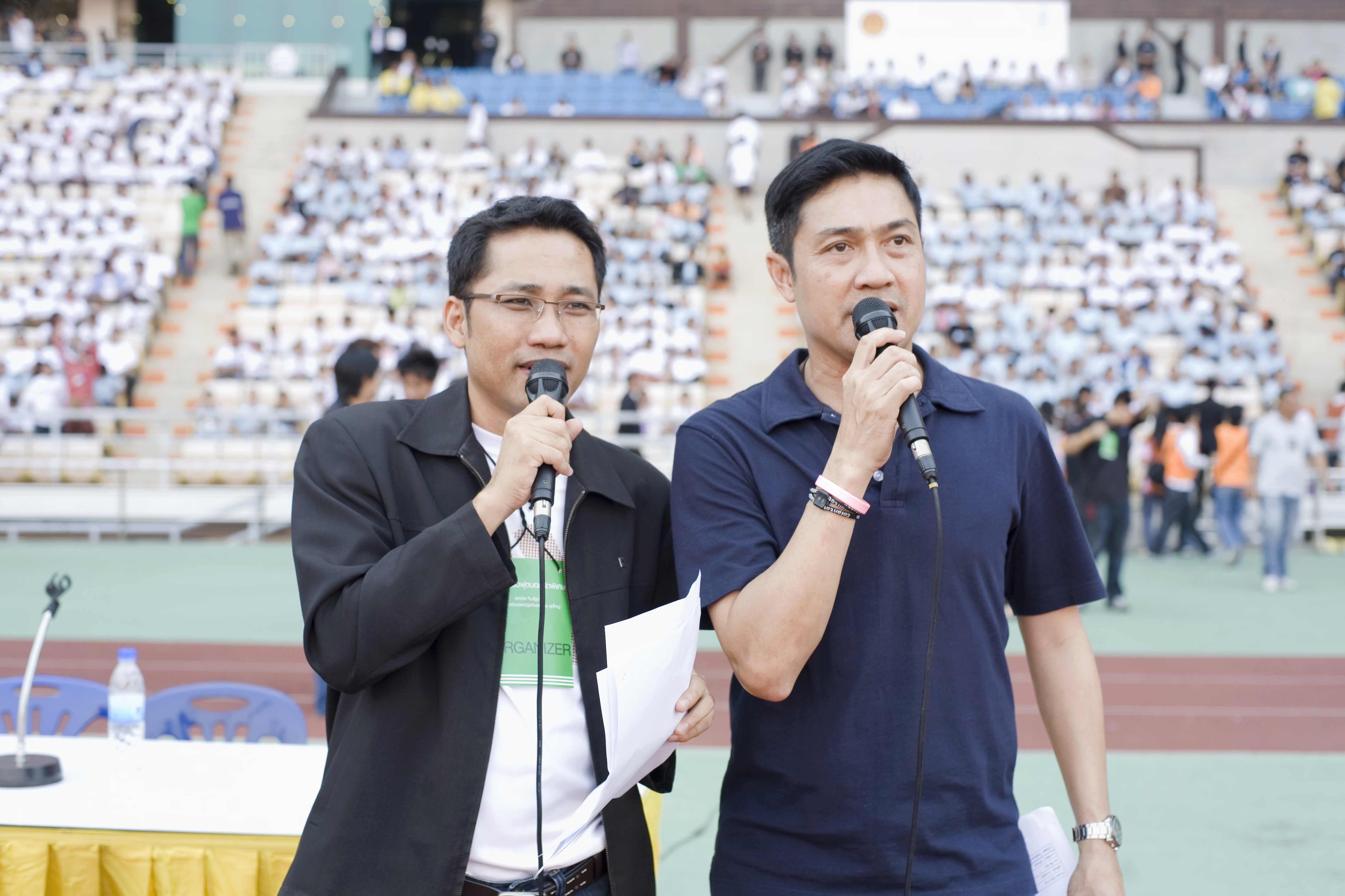 แจ๊คกี้ อดิสรณ์ พึ่งยา / นายกรัฐมนตรี นำทีมนักกีฬาฟุตบอลชายกิตติมศักดิ์เข้าร่วมการแข่งขันฟุตบอลนัดพิเศษกับทีม ฟุตบอลหญิงทีมชาติไทยชุดใหญ่ ณ สนามราชมังคลากีฬาสถาน กรุงเทพฯ 21 กุมภาพันธ์ 2553 (The Official Site of The Prime Minister of Thailand Photo by พีรพัฒน์ วิมลรังครัตน์)